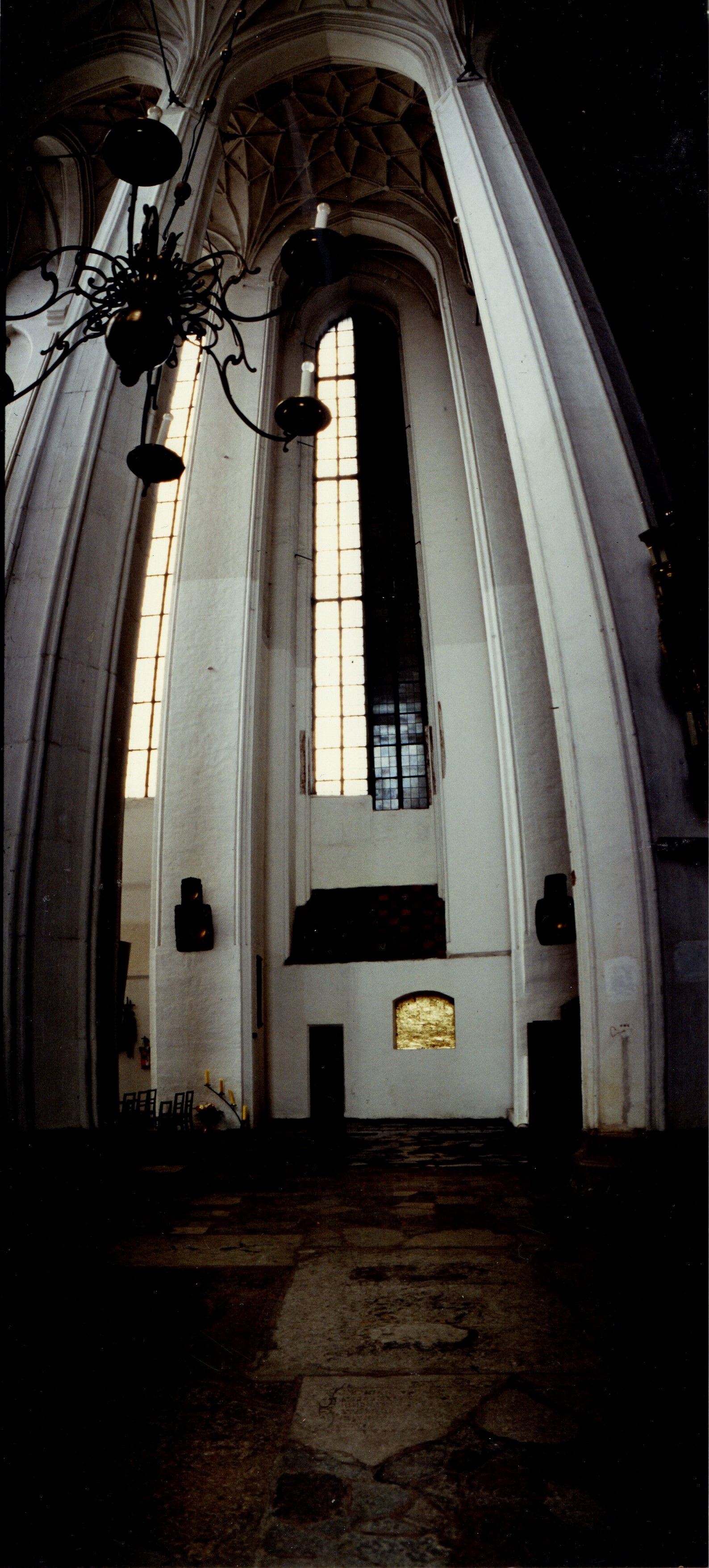 Eric Mayen, niger et aurum w Bazylice Mariackiej w Gdańsku